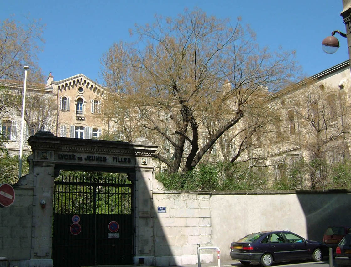 Vue du Collège Longchamp depuis la rue Clapier.